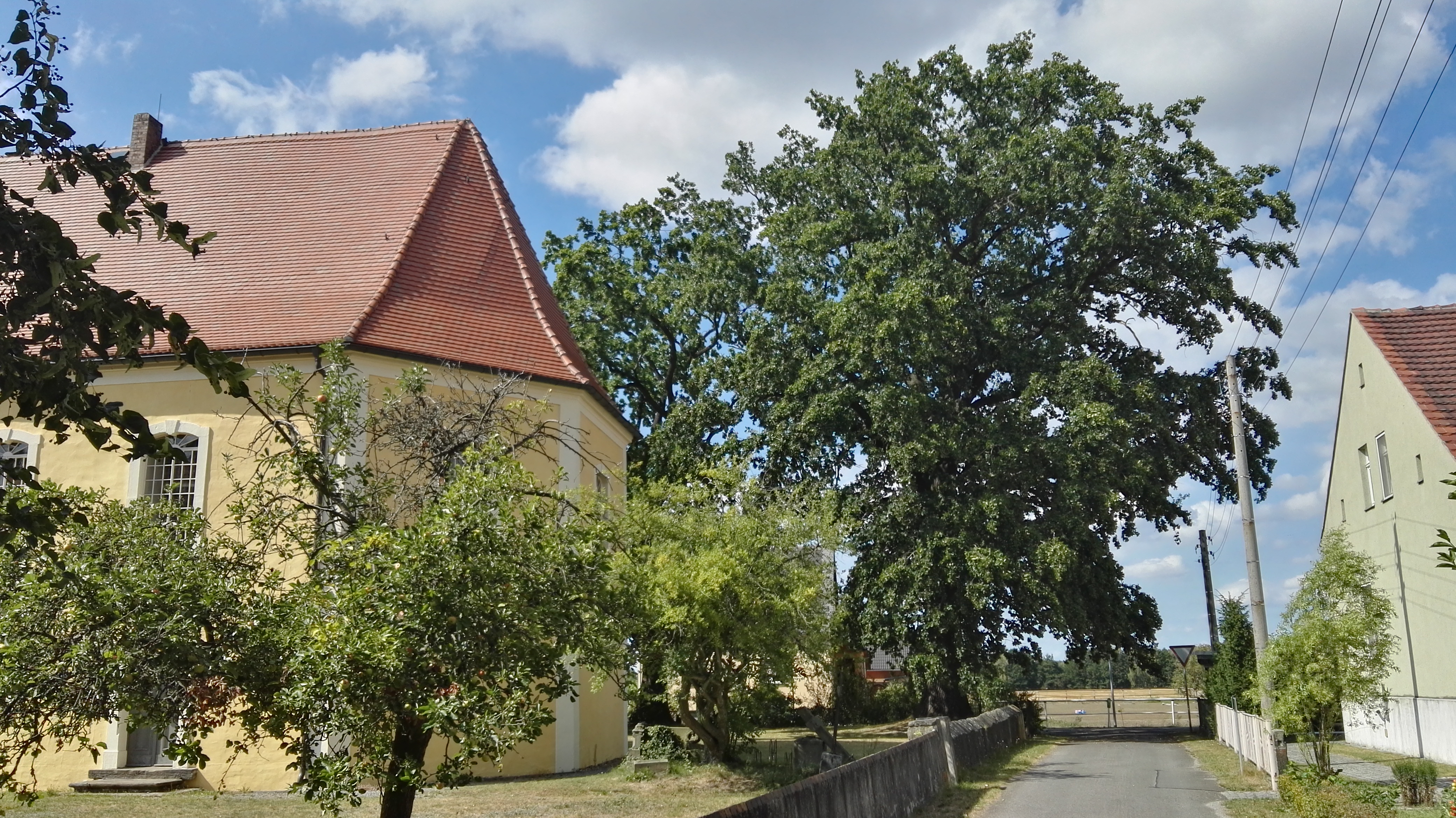 als Naturdenkmal geschützte Stieleiche (1108-4) an der Ecke des Kirchhofs in Kroppen